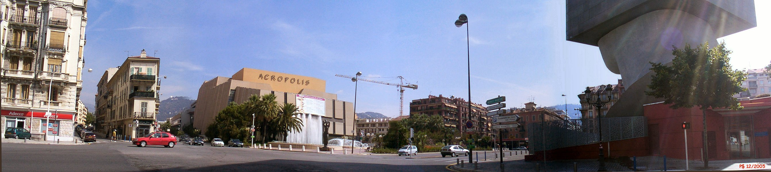 Place Jean Moulin Direction E. A droite, bibliothèque Louis Nucera, à gauche le centre des congrès Acropolis.